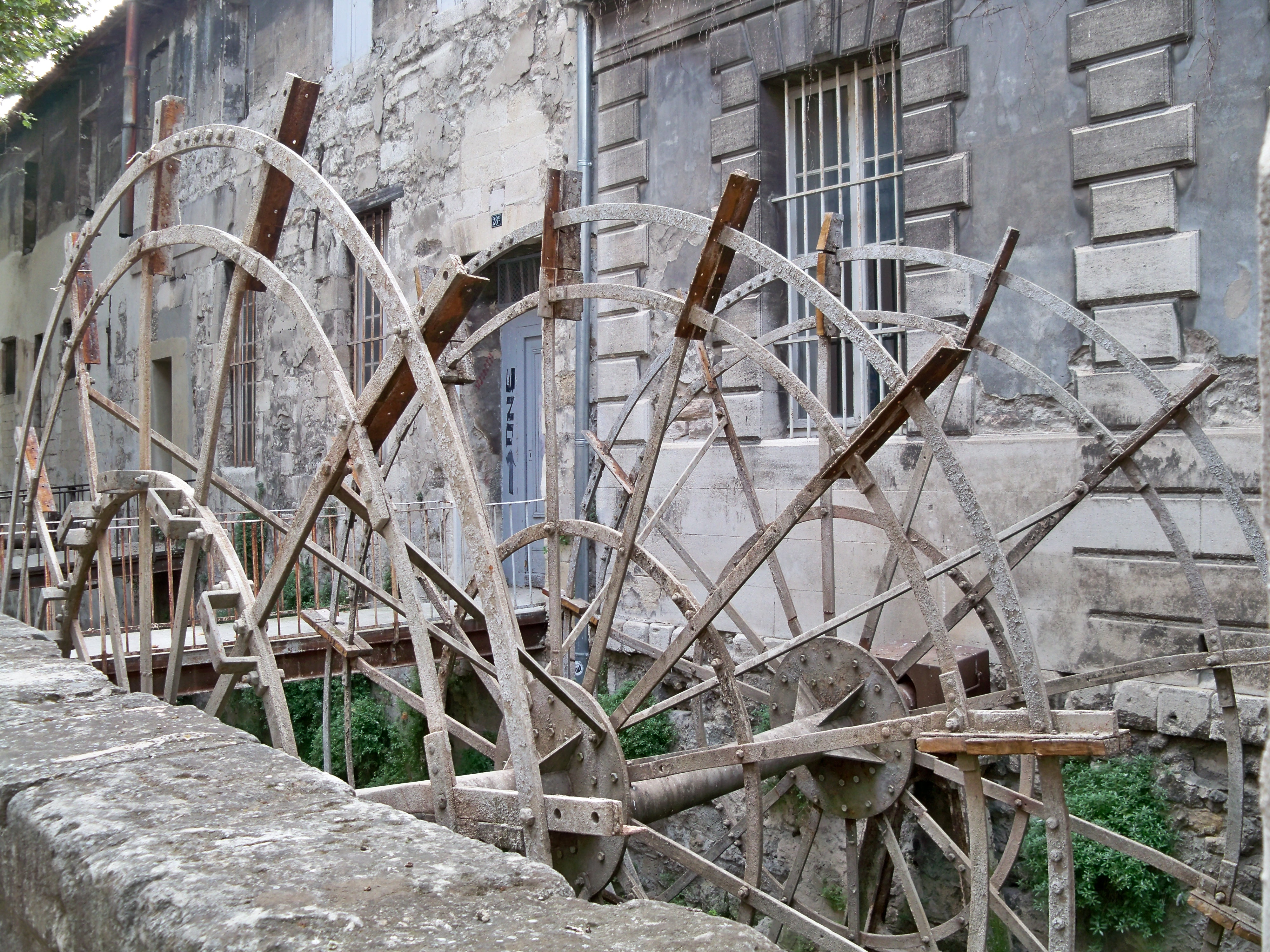 Mécanisme de roues rue des teinturiers d'Avignon, Vaucluse, France